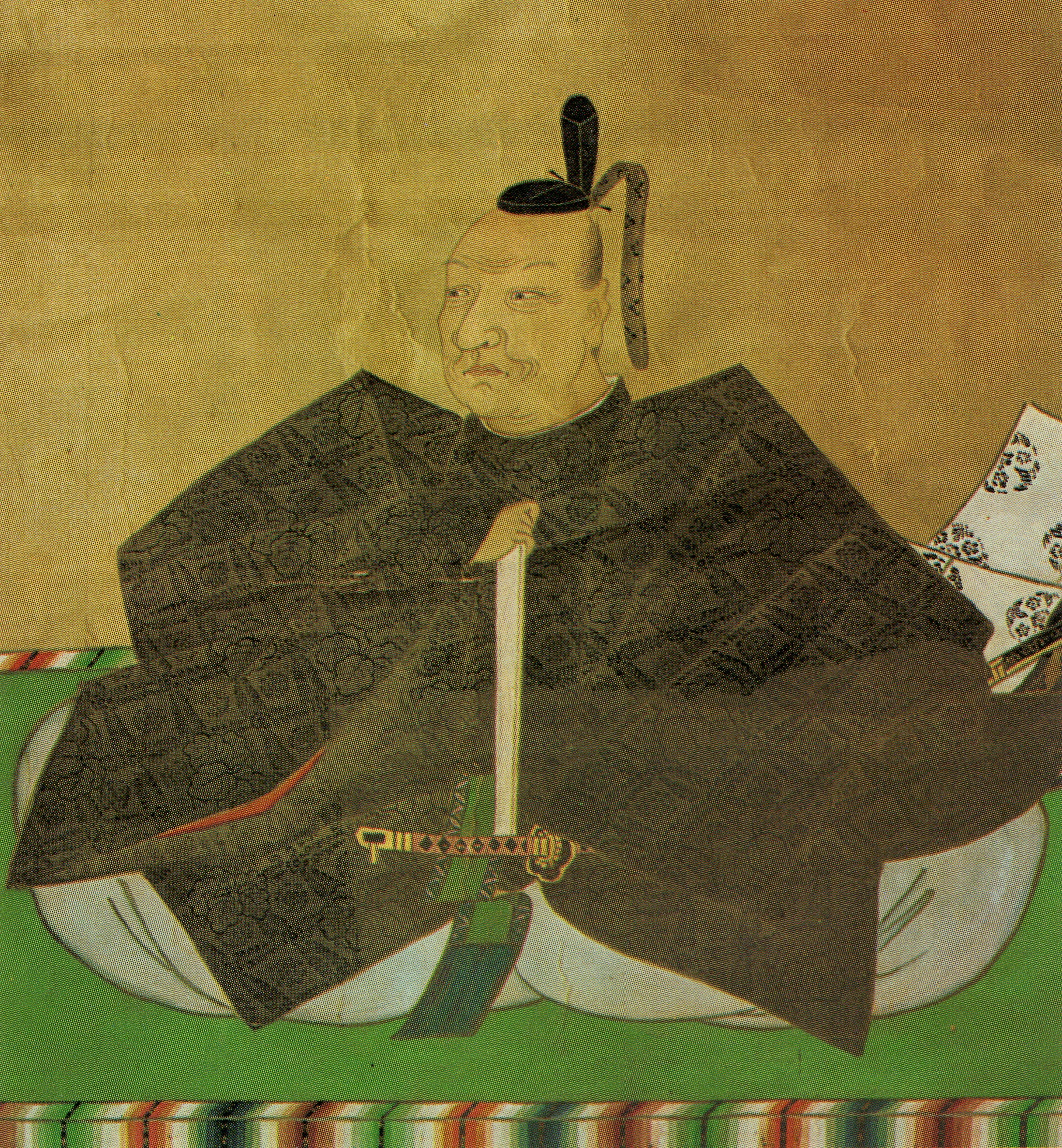 藤堂高次の肖像。